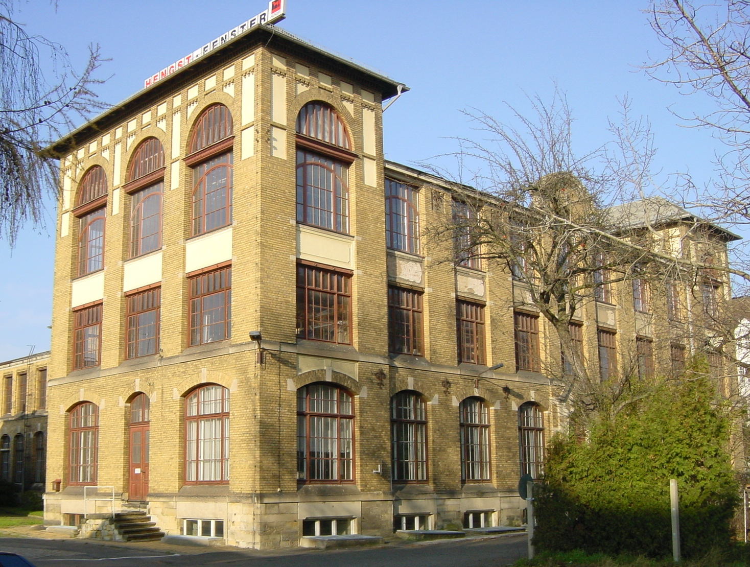 Pirna. Denkmalgeschütztes Hauptgebäude der Möbelfabrik Hengst